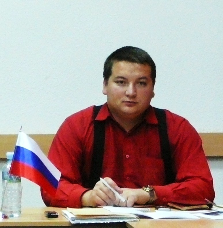 Сулейманов Раис Равкатович (род. 25 июня 1984, Казань, СССР) — российский религиовед и исследователь ислама, специалист по исламскому радикализму, исследователь этнорелигиозных конфликтов в Поволжье.